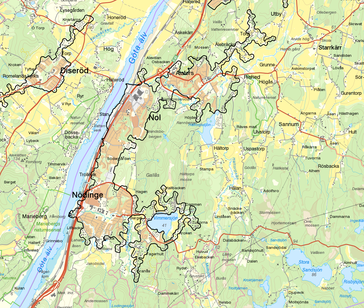 Tätorten Nödinge-Nol med gränserna från Statistiska centralbyråns tätortsavgränsning 2015 i svart. Bakgrundskarta från Lantmäteriet, skala 1:30 236. På kartan syns även del av tätorten Diseröd.